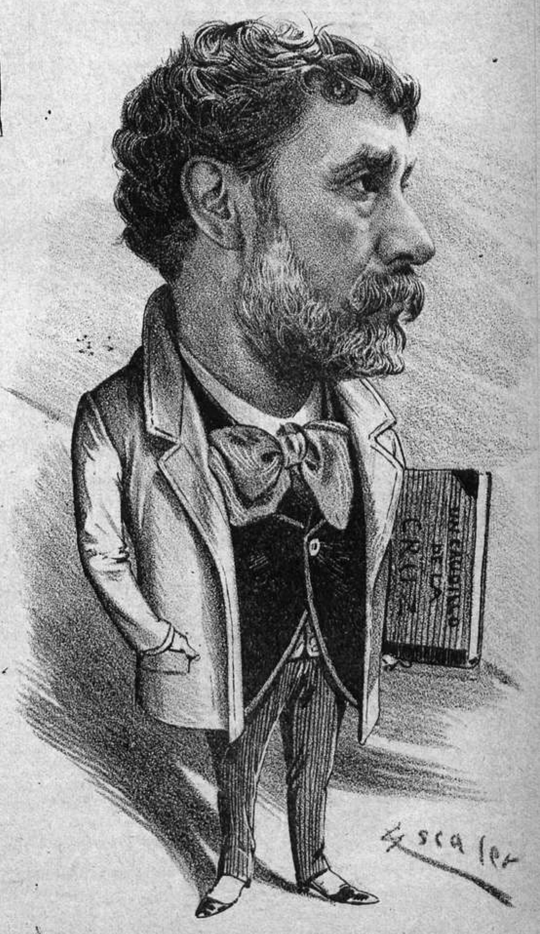 La Semana Cómica, 3 de mayo de 1889.